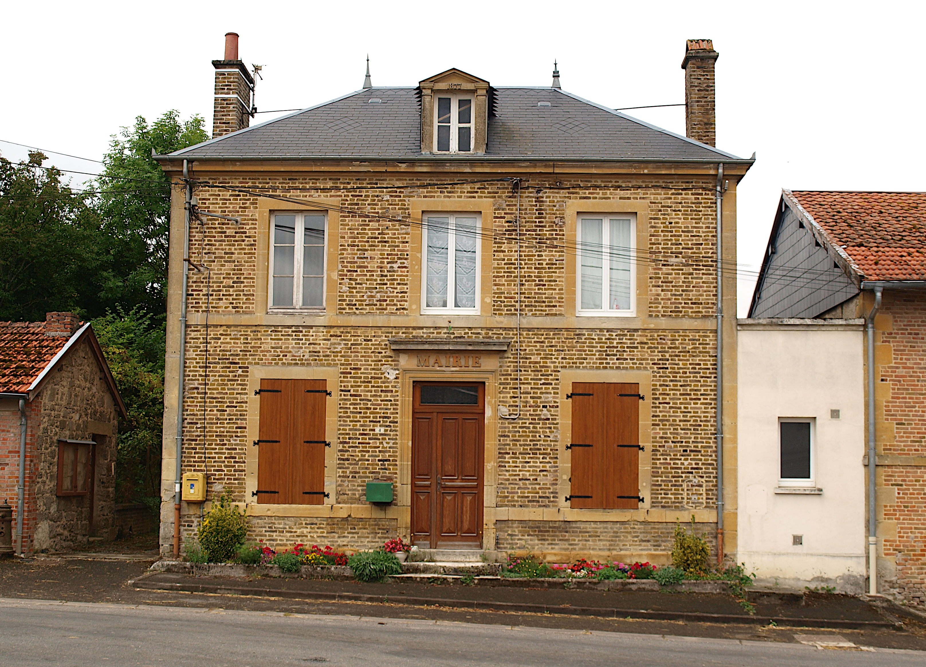 Vaux-lès-Mouron (Ardennes, France) ; mairie.